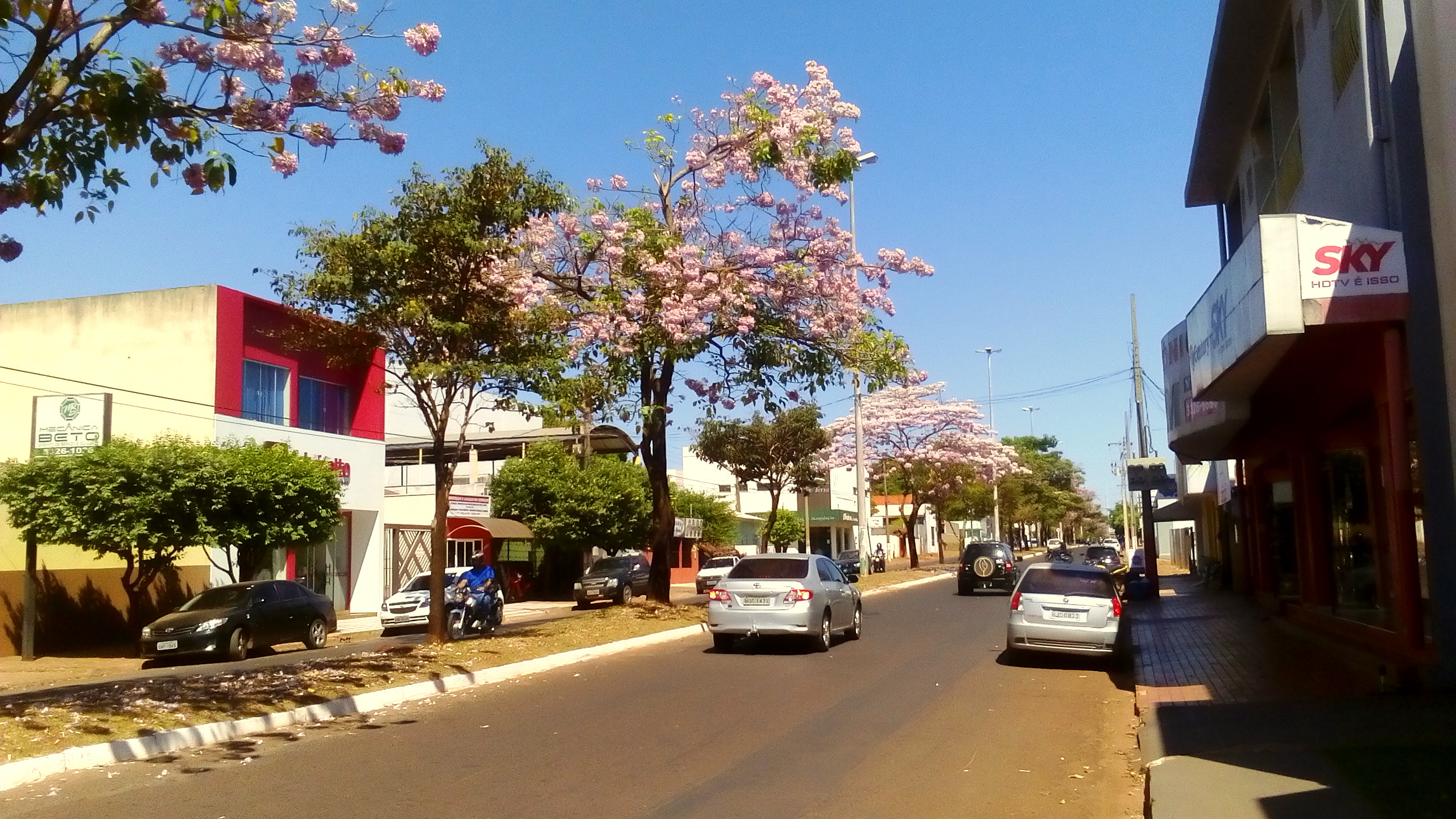 Av. Ismael José do Nascimento - Ipês